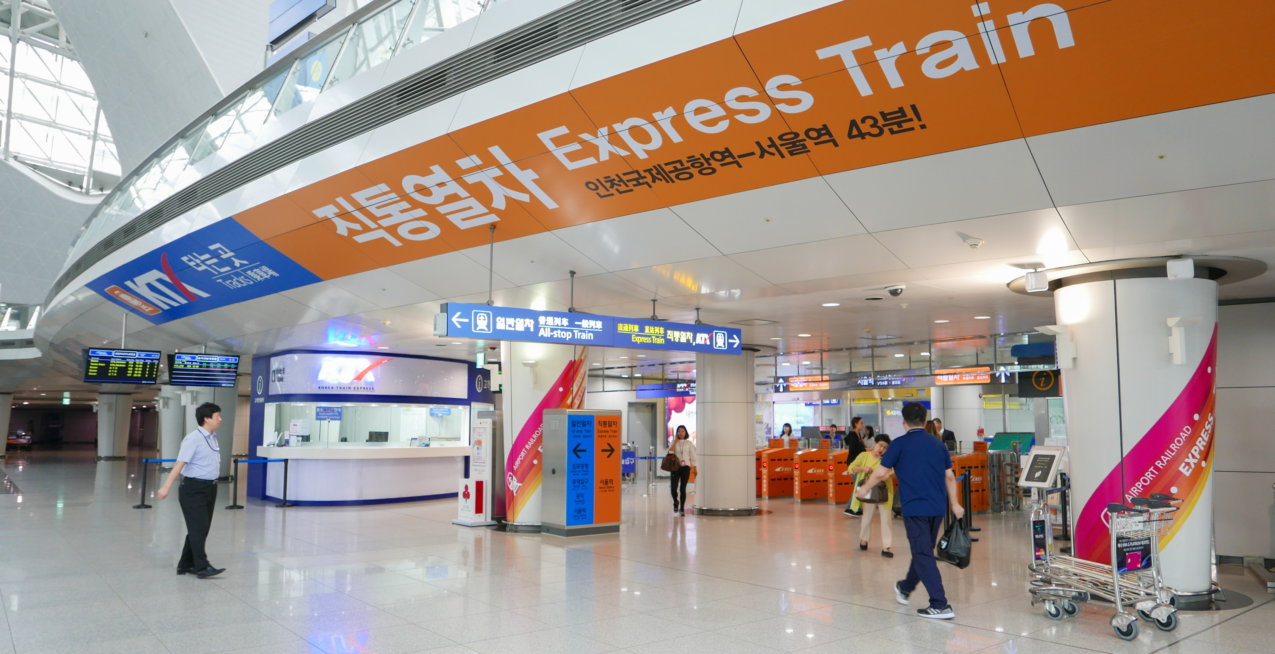 仁川国際空港駅 KTX・直通列車用改札